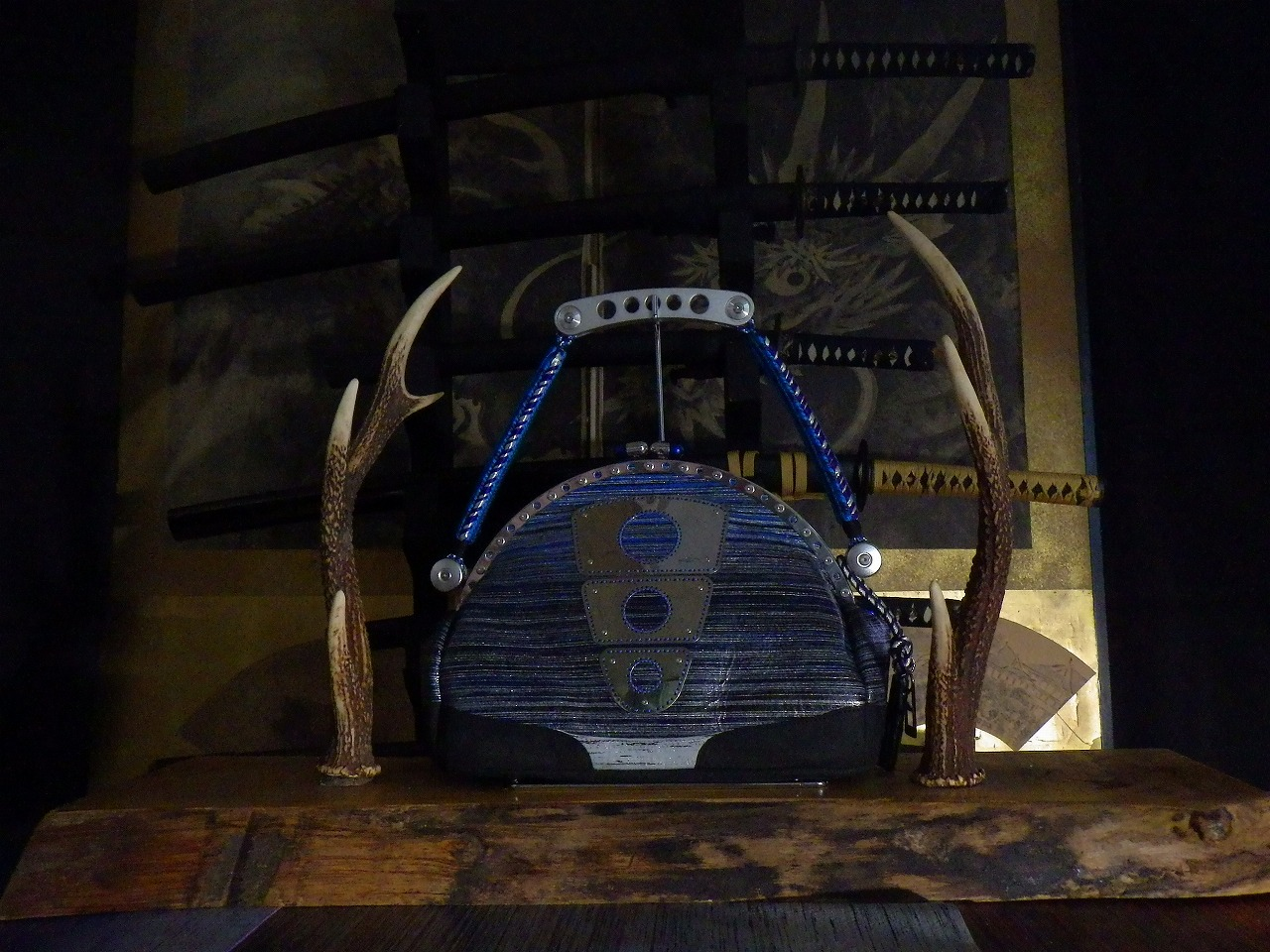 デン・コーポレーション製 がま口バッグ （京都） 2014年8月31日～9月3日のミペルザバッグショーでパノラマ部門受賞 矢野健太＆高尾利幸